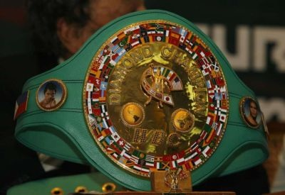 WBC I OMB